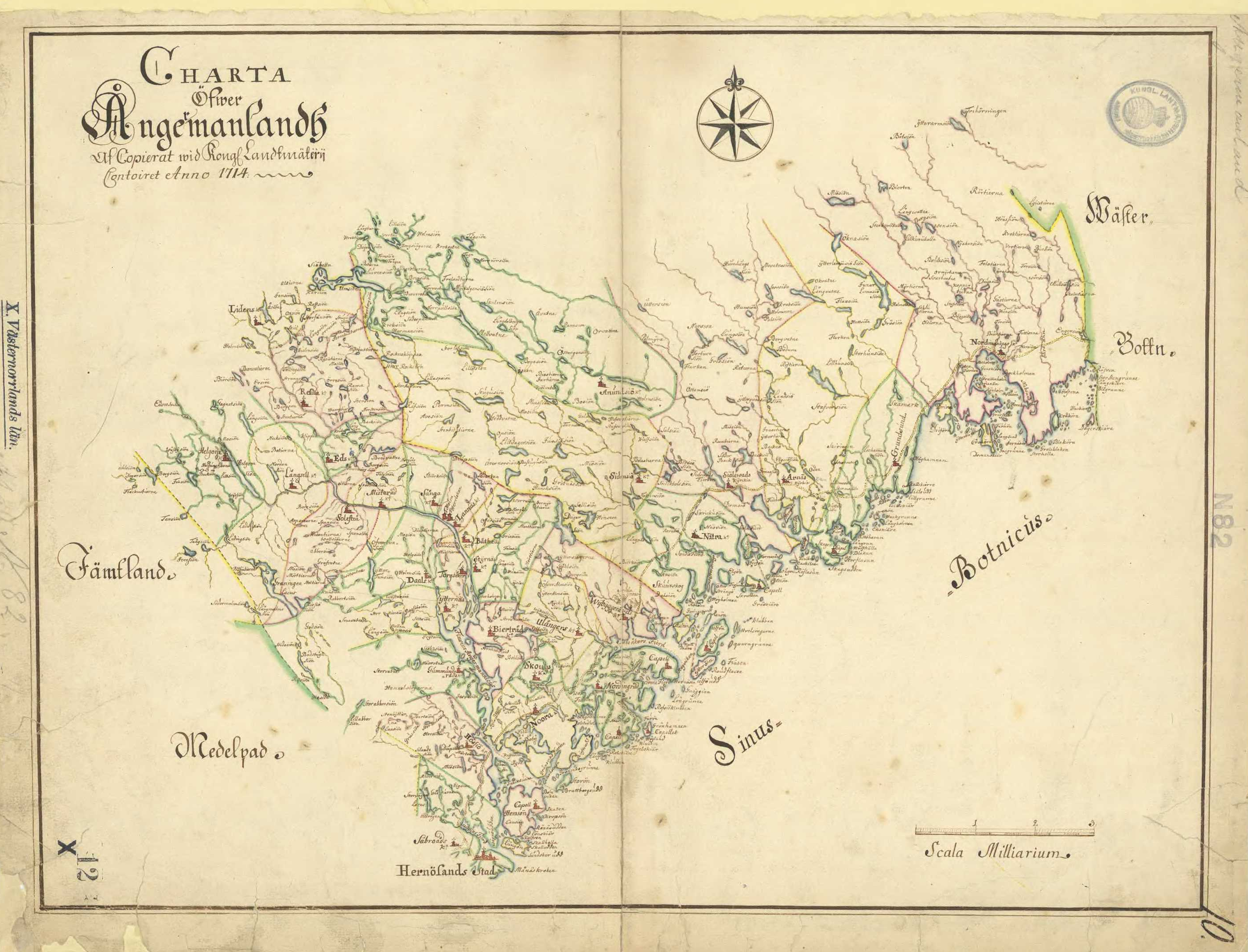 Historisk karta över Ångermanland.